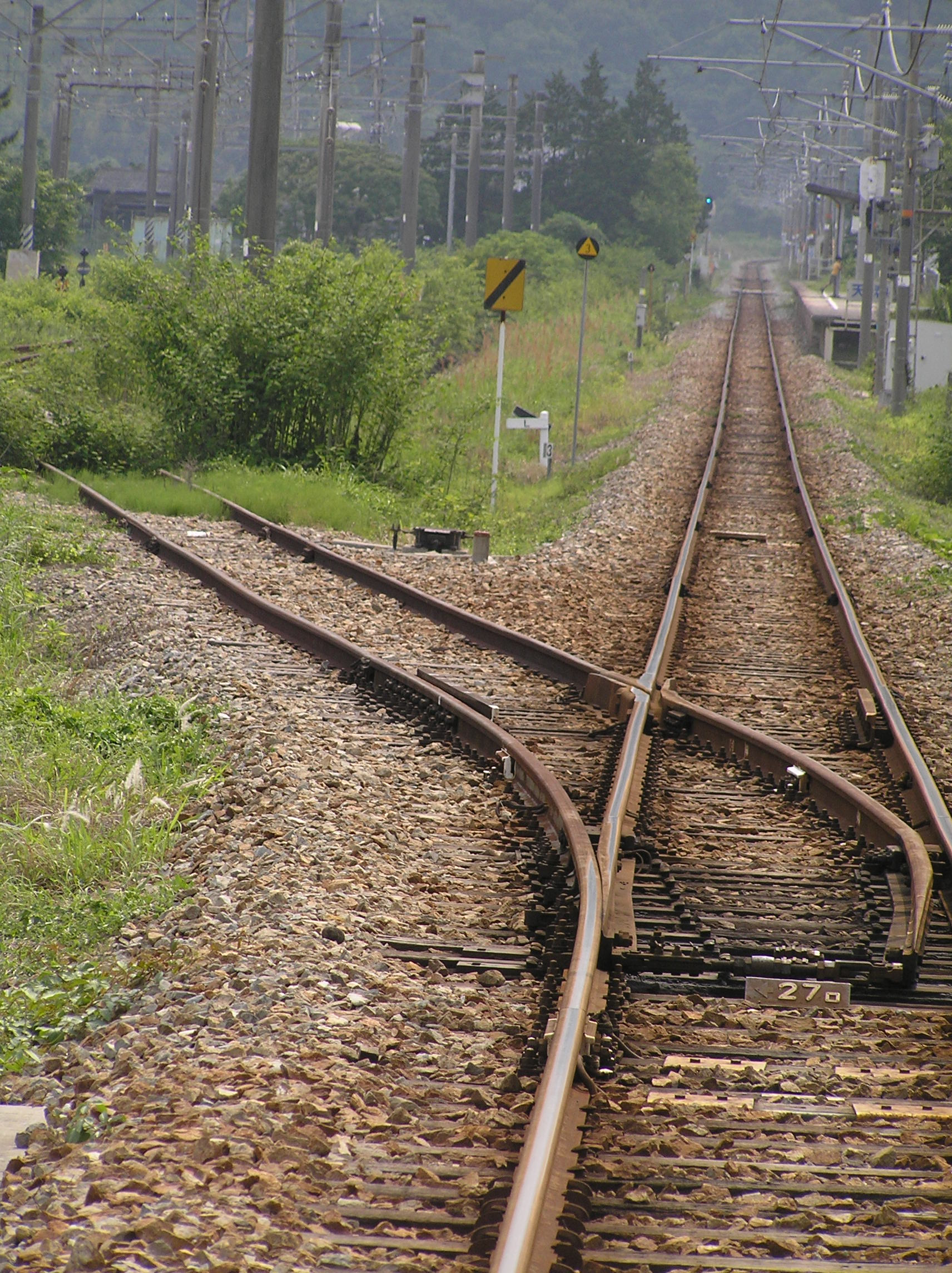 JR西日本 赤穂線 天和駅